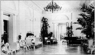 Усадьба Черемушки. Белый зал